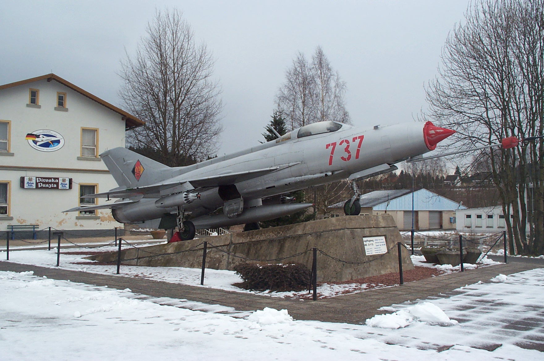 Die von Sigmund Jähn geflogene MiG 21F-13 vor der „Deutschen Raumfahrtausstellung“